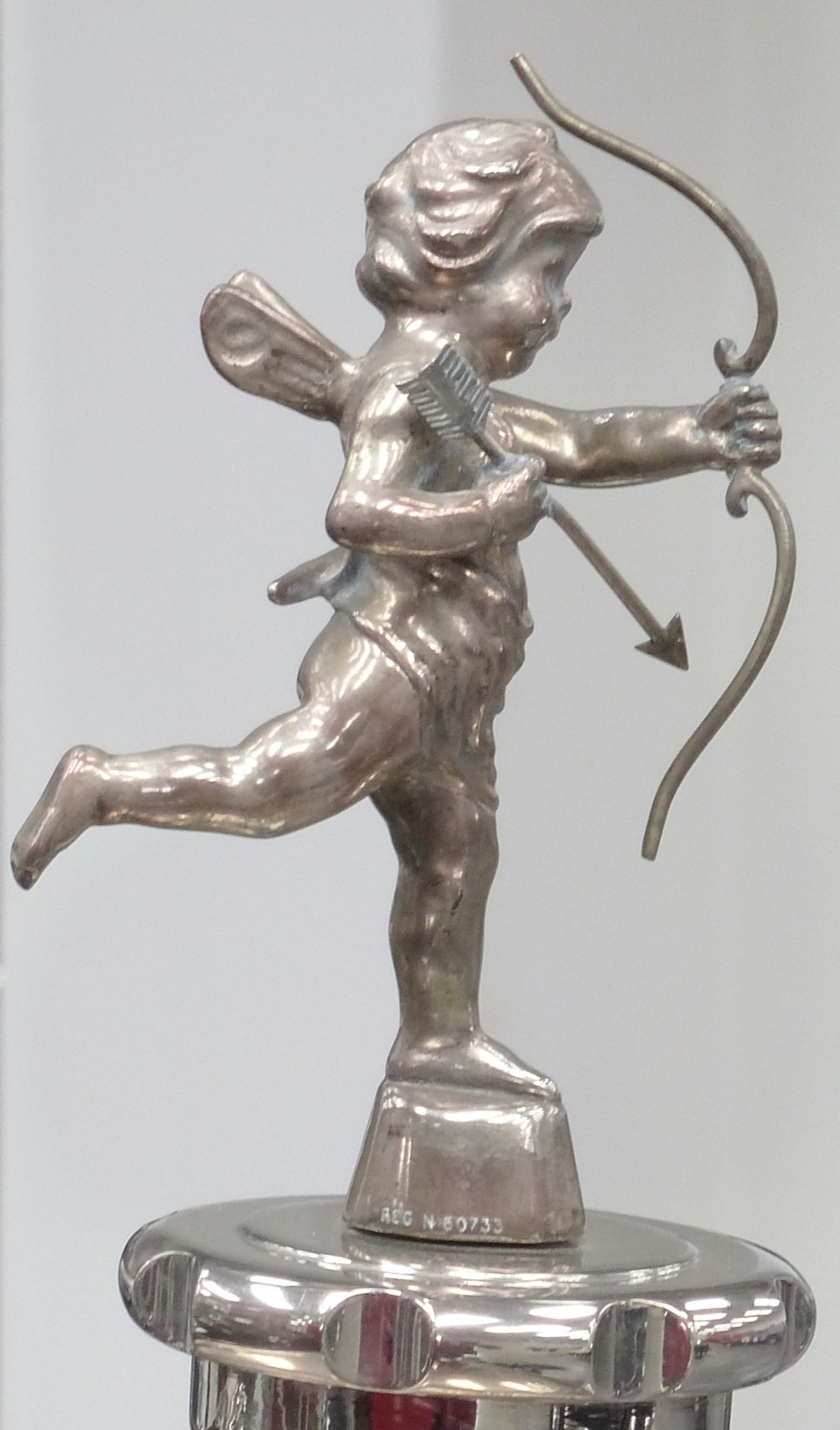 Emblem Cubitt Kühlerfigur